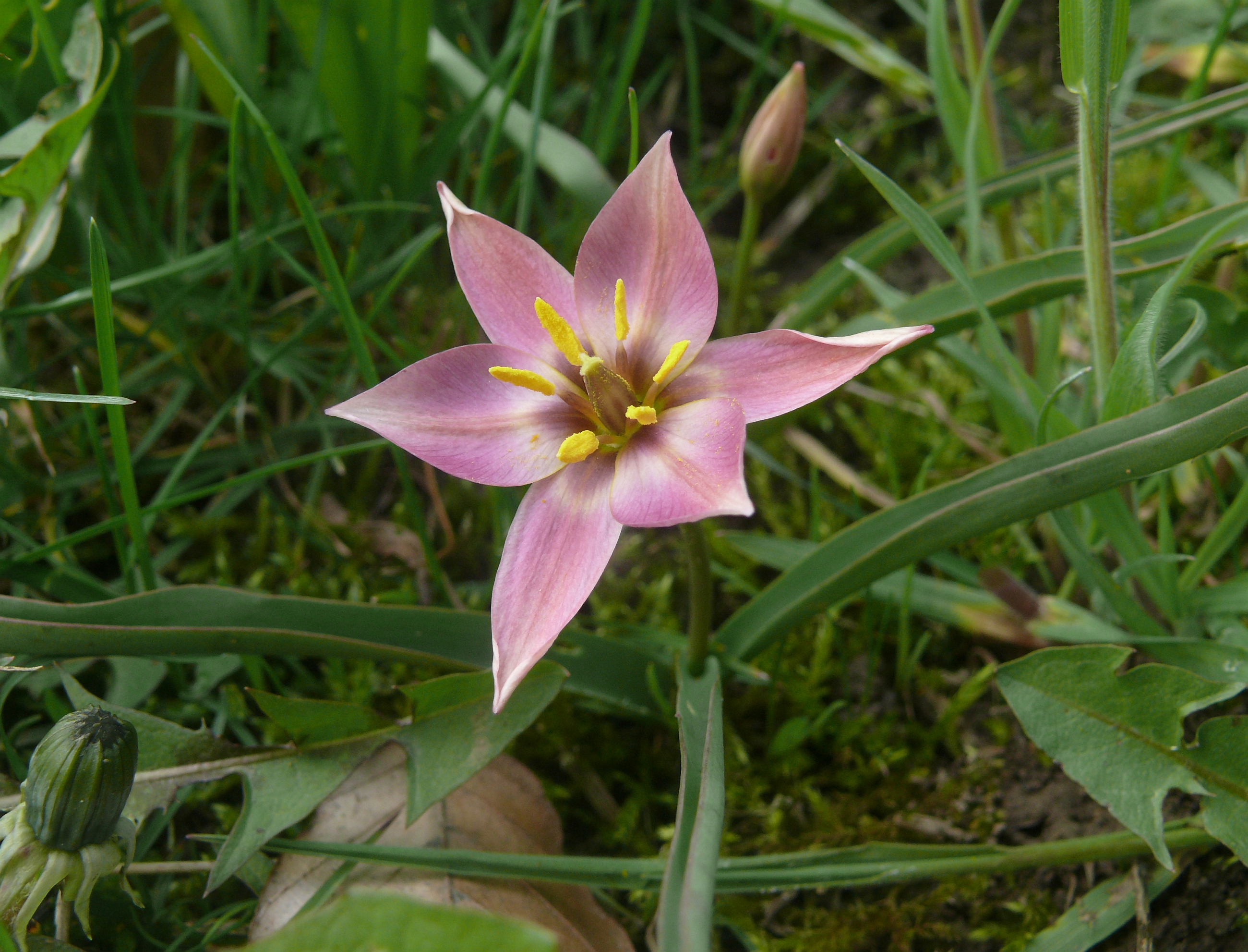 Tulipa aucheriana, garden